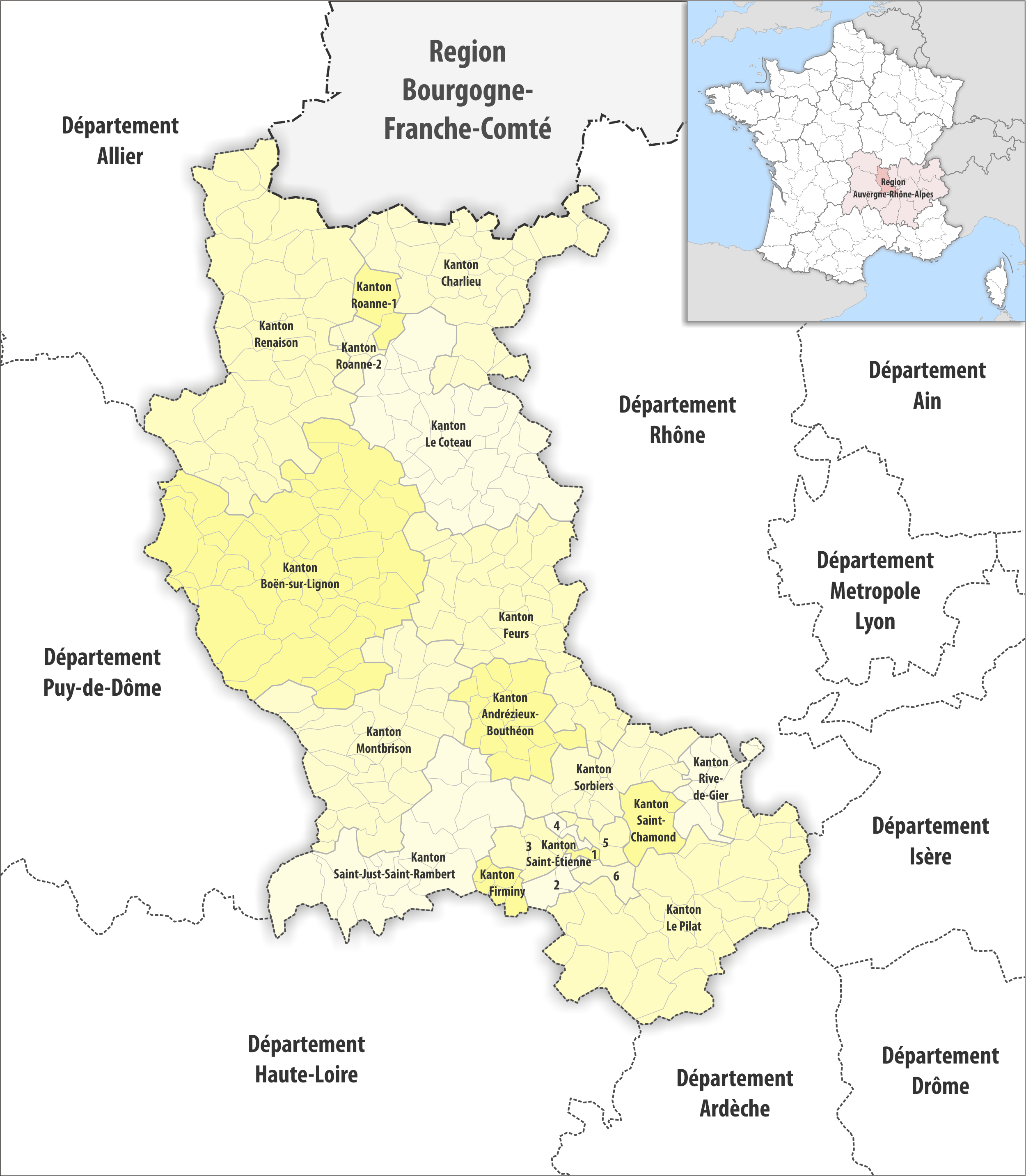 Gemeinden und Kantone im Departement Loire